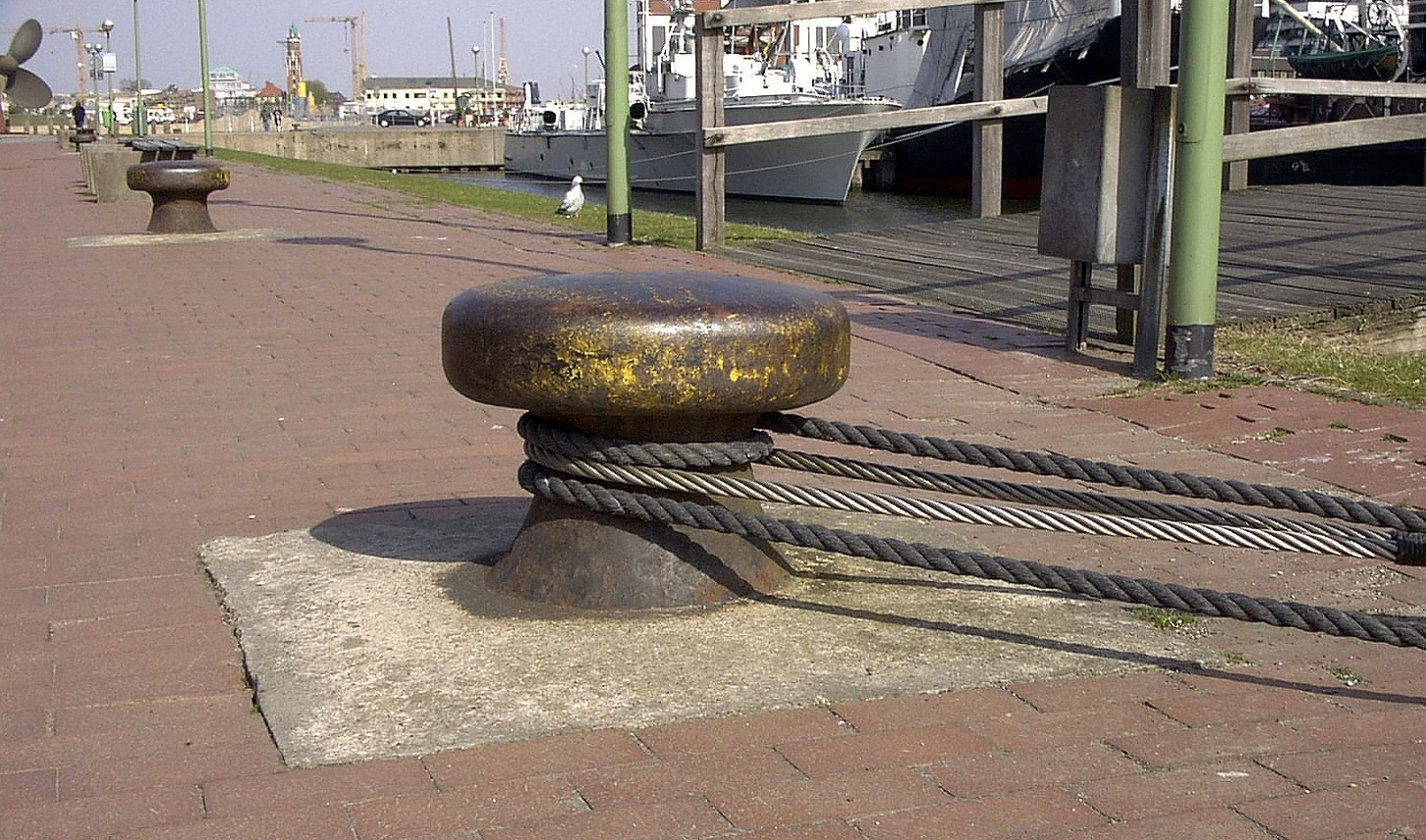 Mittelgroßer Hafenpoller in Bremerhaven von Uwe H. Friese aus Bremerhaven 2002 selbst fotografiert.